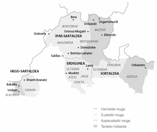 Nafar euskararen mapa (Koldo Zuazo, 2015)